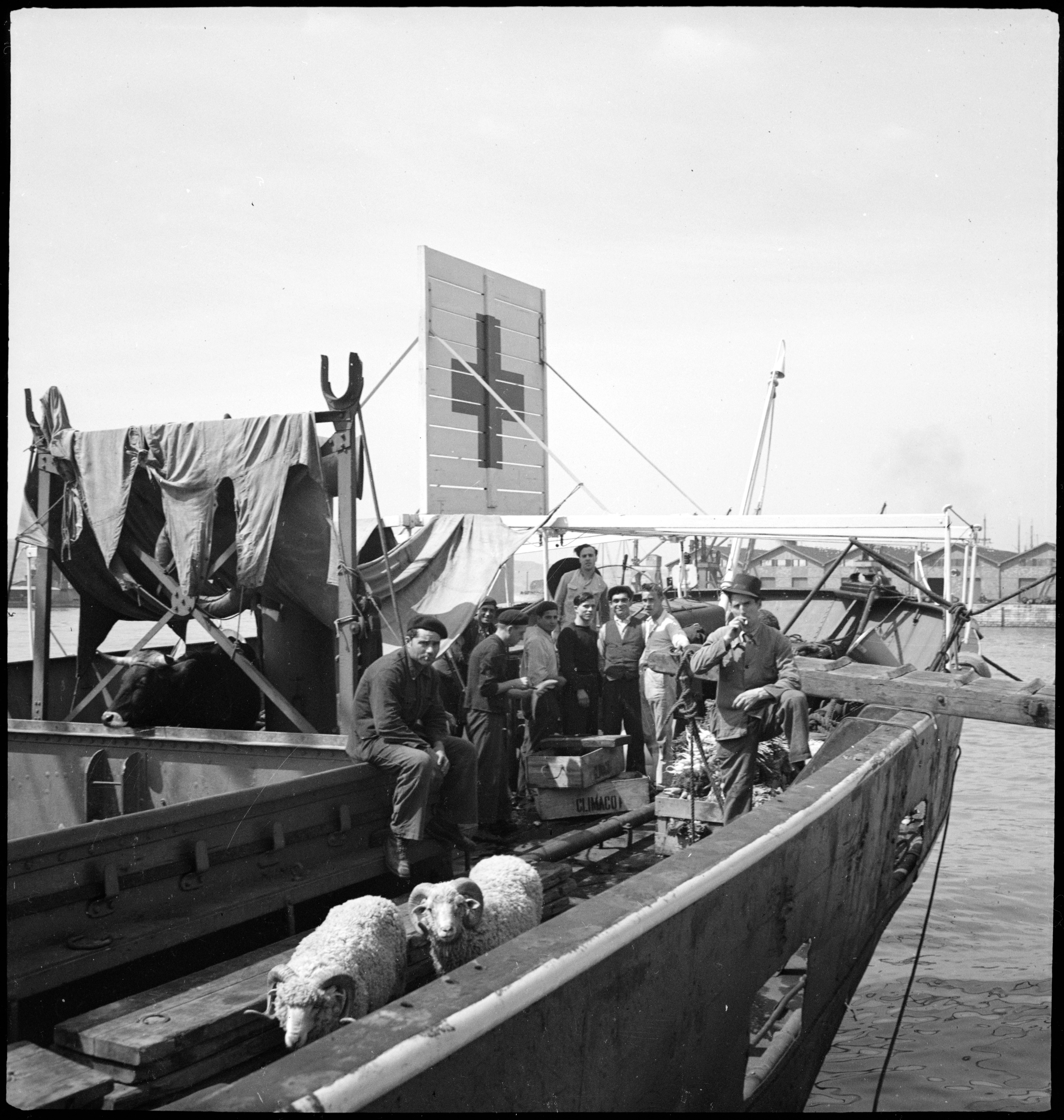 Portugal, Lissabon (Lisboa): Schiff Silva Gouveia; Männer und Tiere an Deck eines Schiffes mit der Flagge des Roten Kreuzes